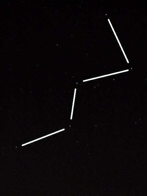 Cassiopeia constellation